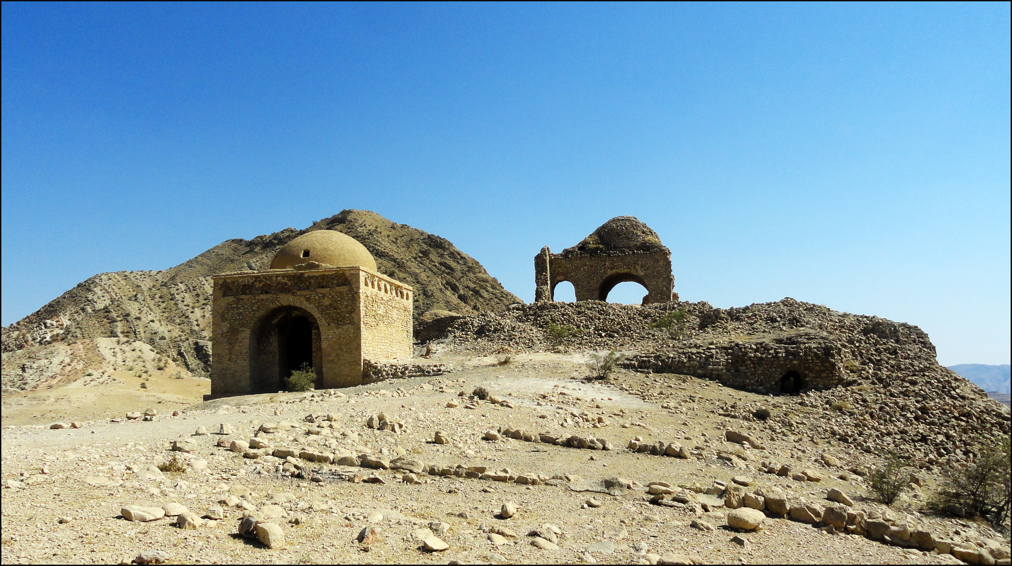 Chartaqi of Konar Siyah چهارطاقی کنارسیاه